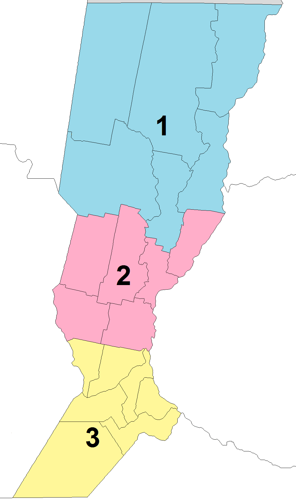 Distritos electorales de la provincia de Santa Fe, usadas en 1963